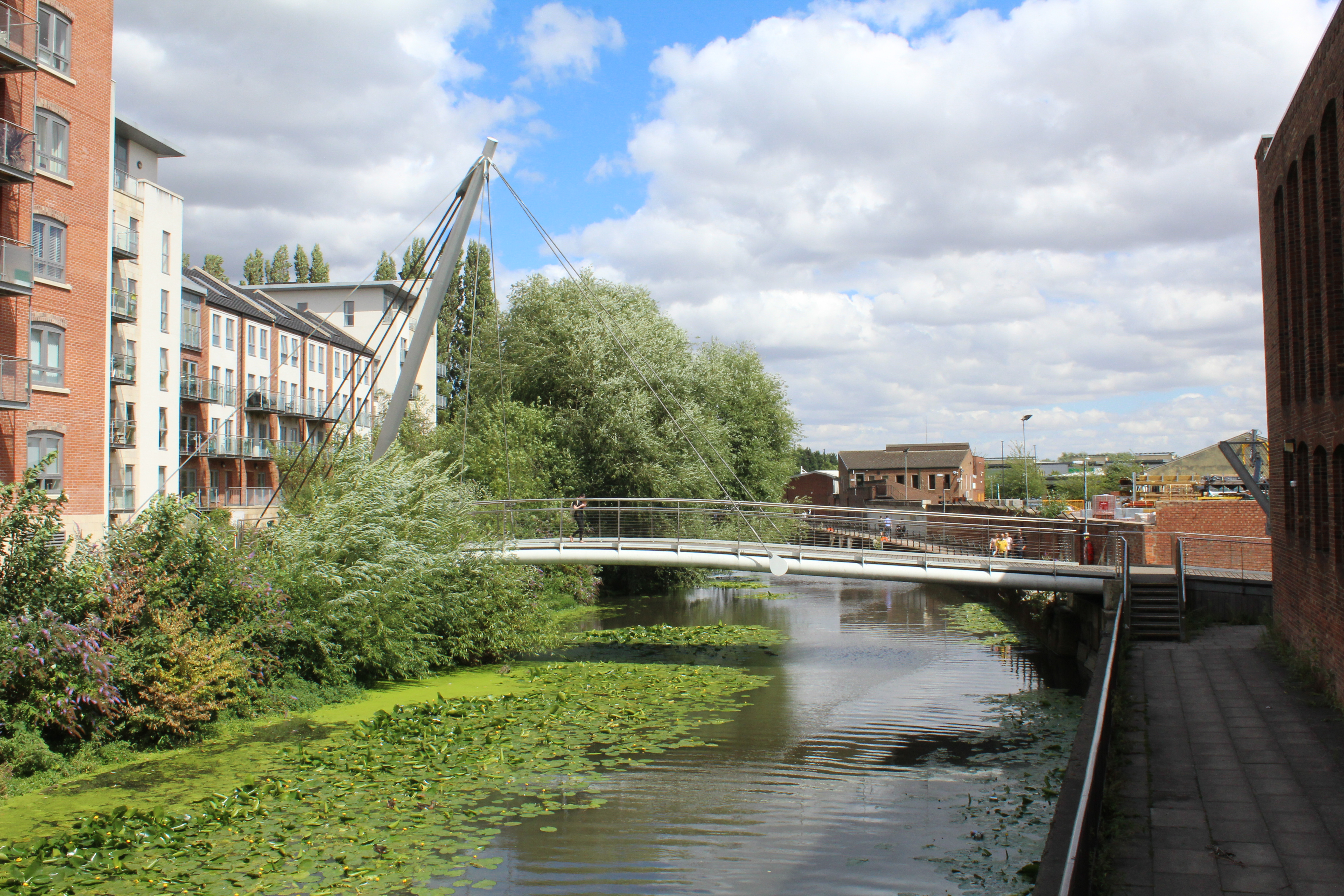 Pont Hungate, York.